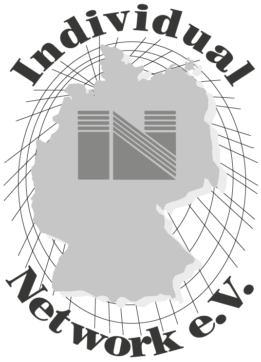 Logo des ehemaligen Individual Network e. V. (IN)